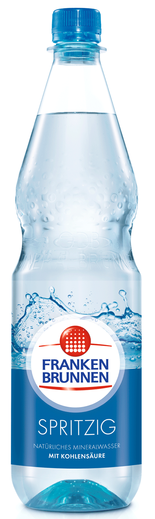 Franken Brunnen Spritzig, aktuelle Abfüllung in der 1,0 Liter-PET-Flasche